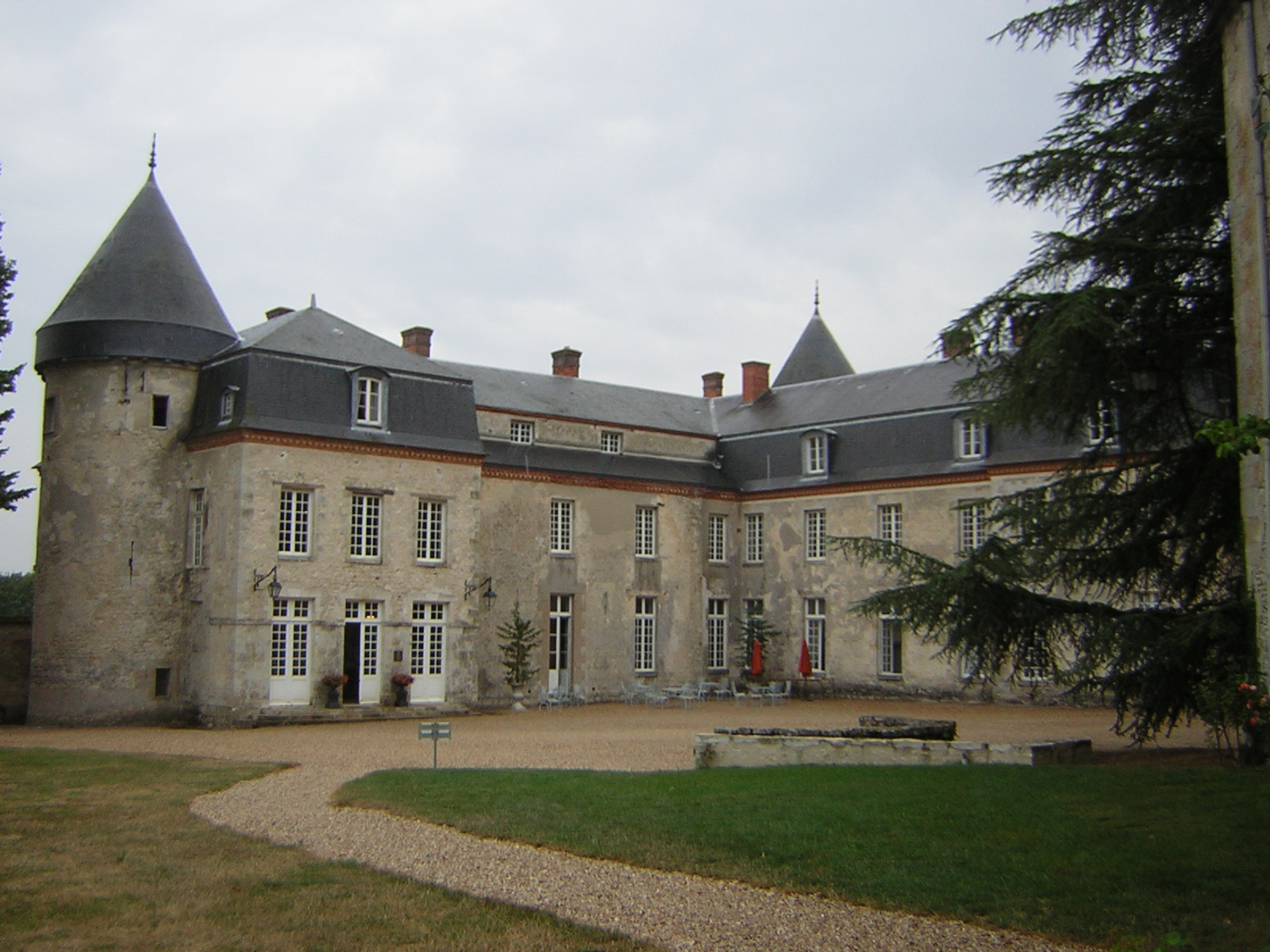 Malesherbes (45) Château (arrière)